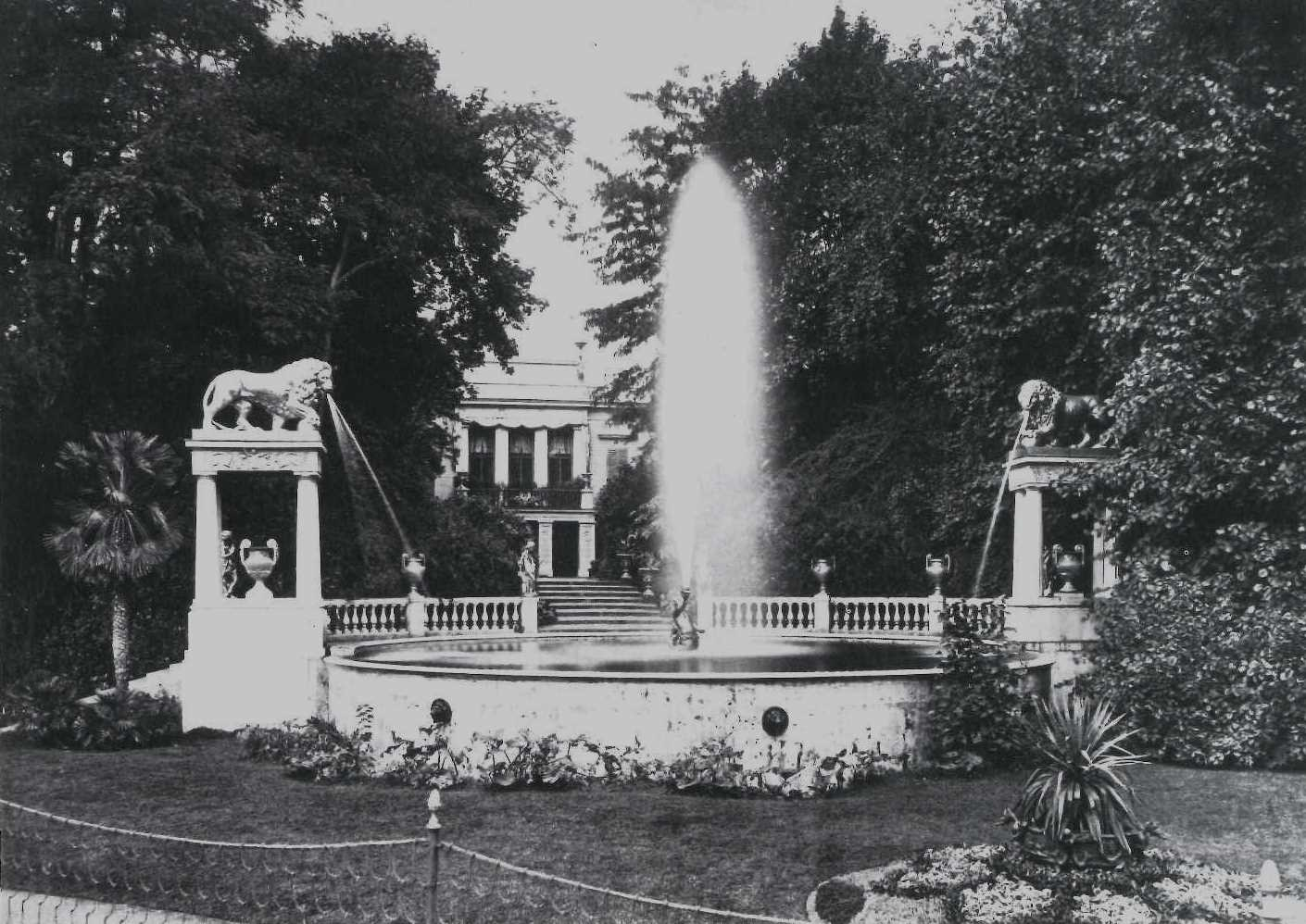 Löwenfontäne von Süd (Foto Robert Scholz, um 1875)